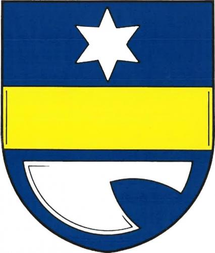 Hartinkov znak